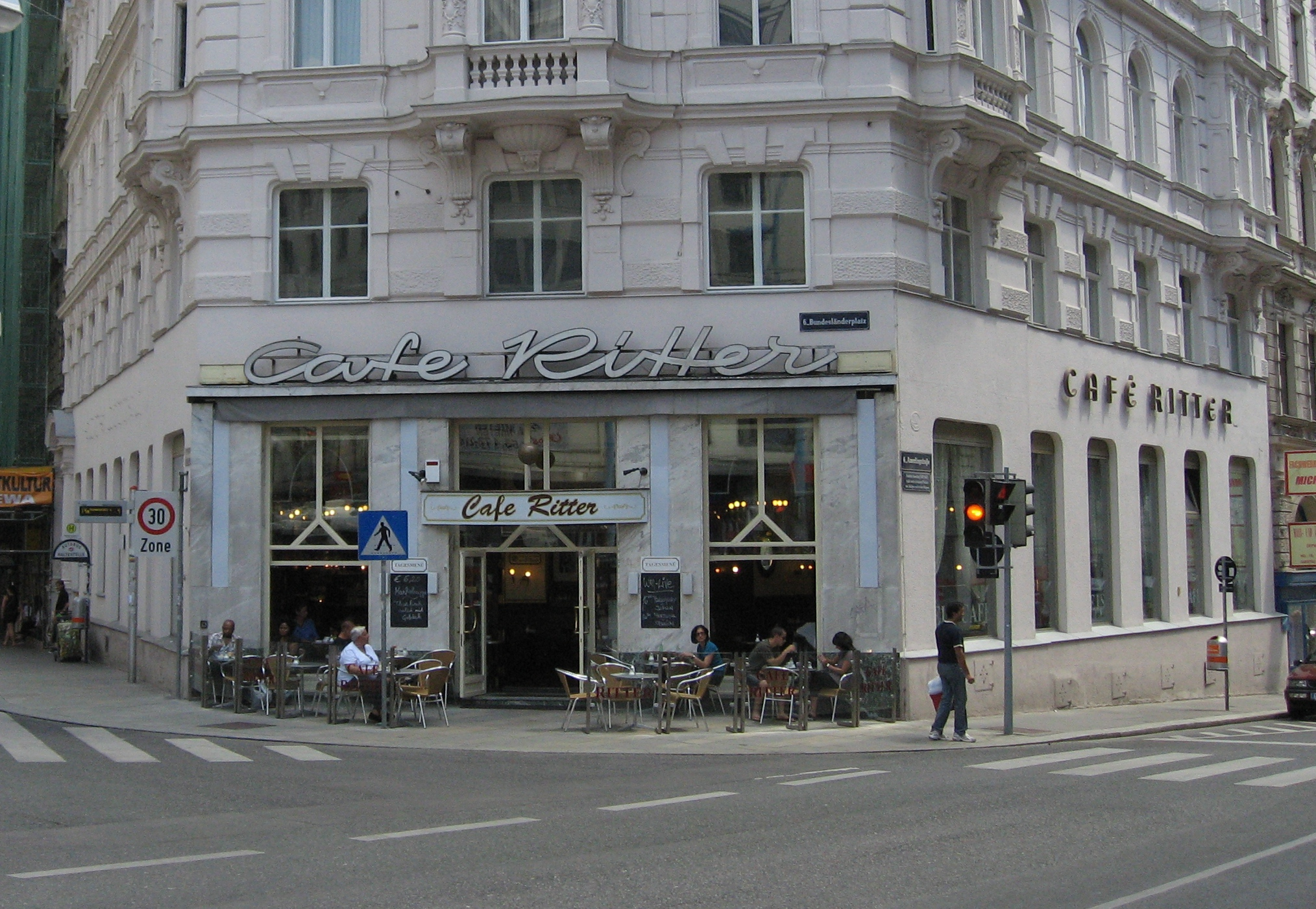 Wien, Cafe Ritter